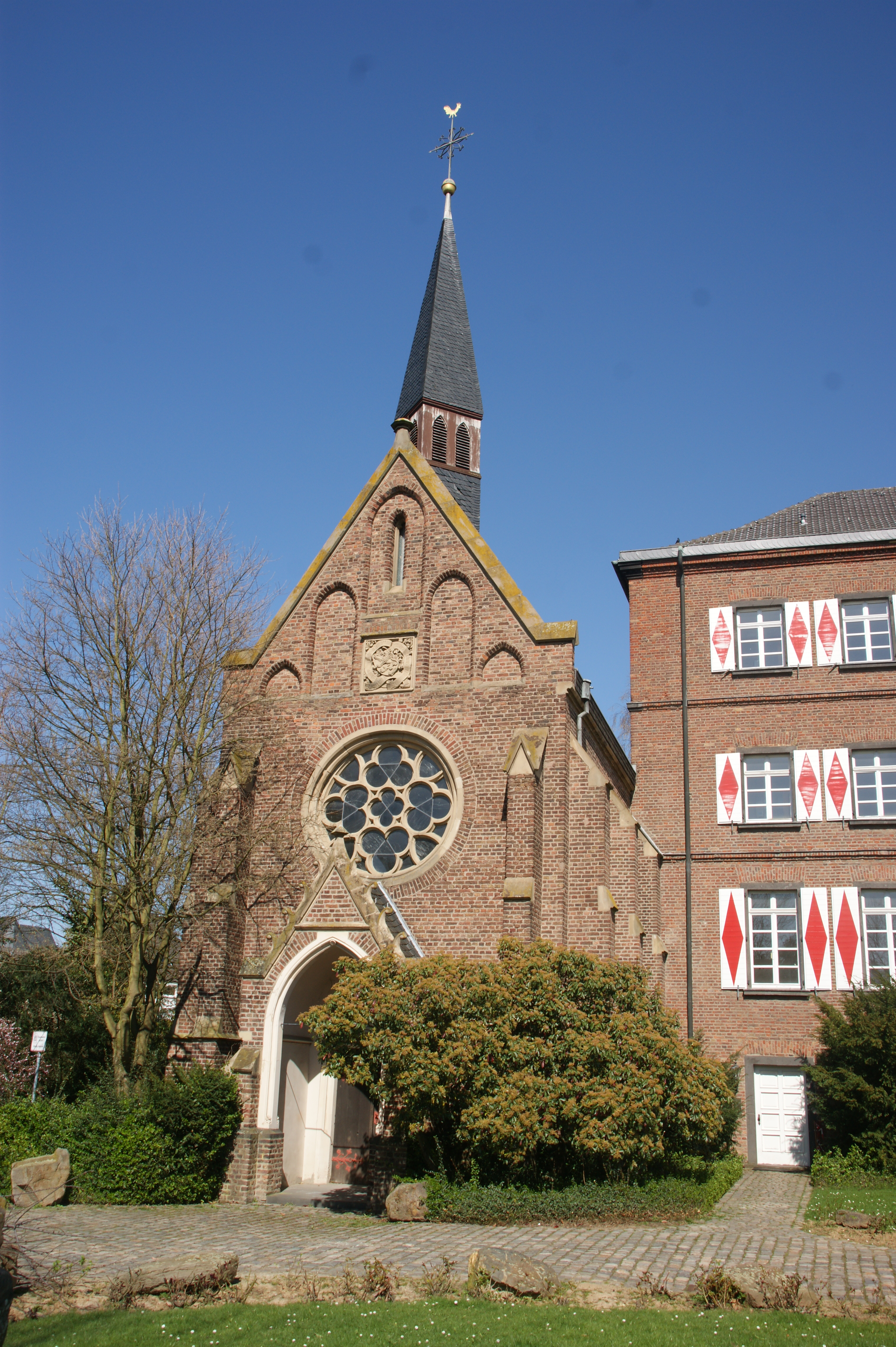 Schloss Bedburg, Kapelle der Rheinischen Ritterakademie, 2011 abgerissen